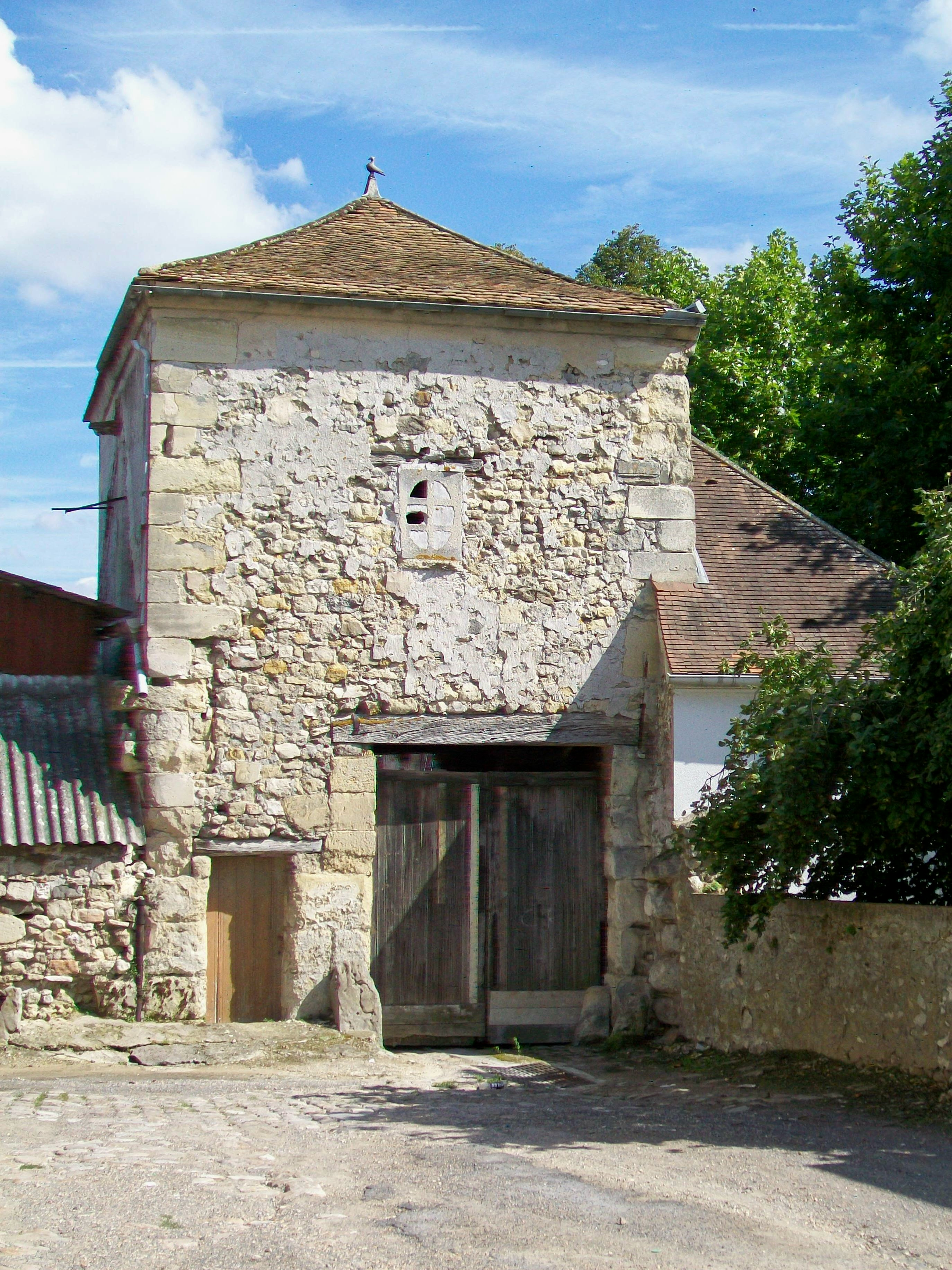 Le colombier-porche du début du XVIIe siècle de la ferme 35 rue de Paris, donnant sur la rue du Milton.